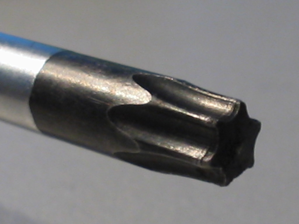 torx sleutel Categorie:Wikipedia:Afbeeldingen/Gebruiker:Michiel1972